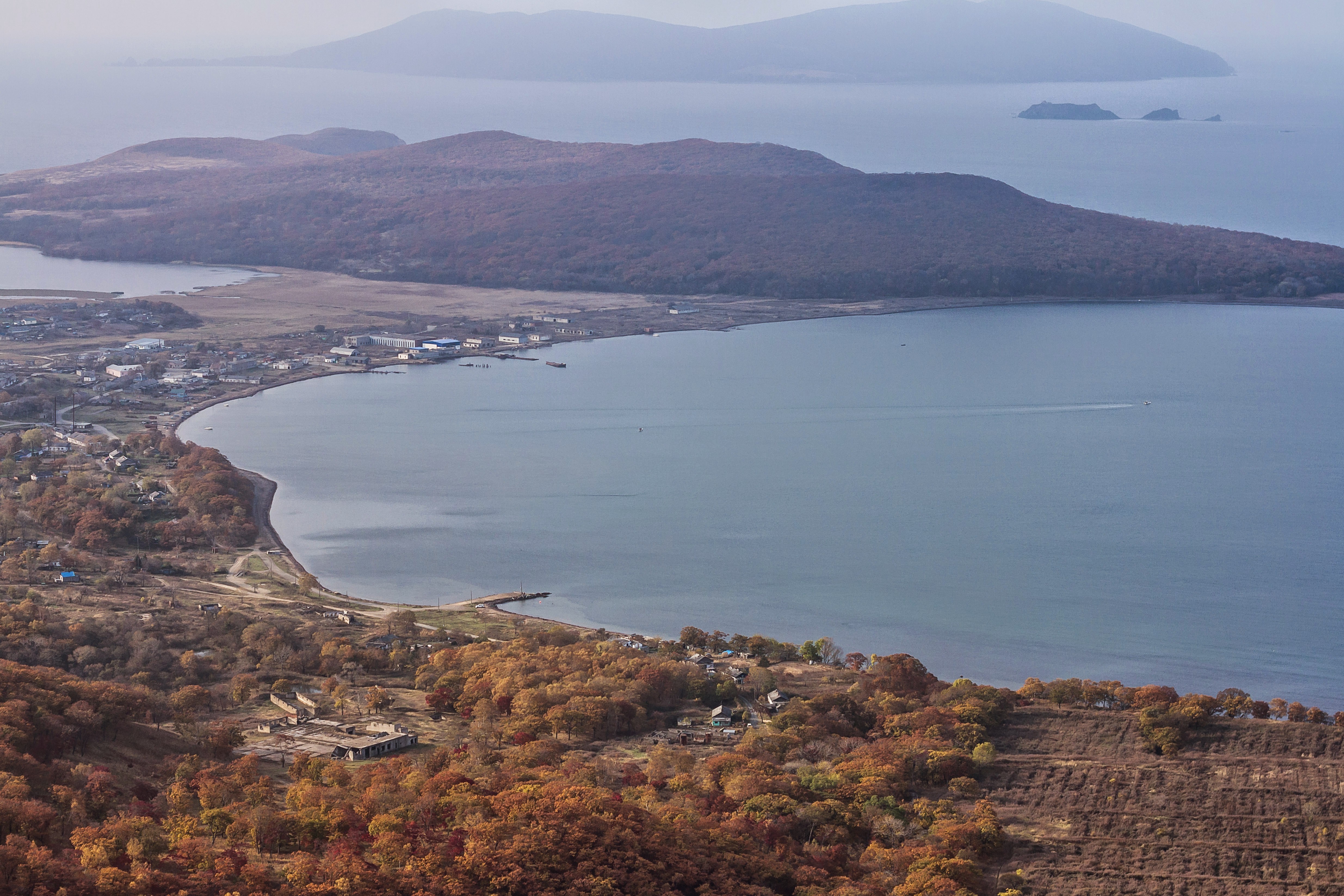 Посёлок Путятин с горы Старцева (Приморский край)